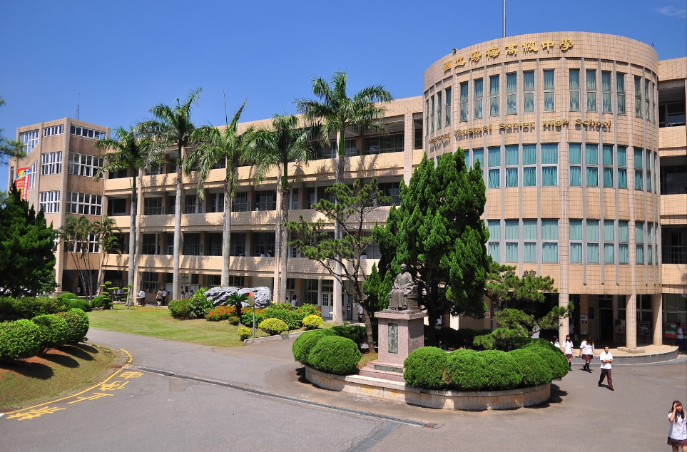 中文（台灣）: 國立楊梅高級中學，位於臺灣桃園市楊梅區高獅路5號。